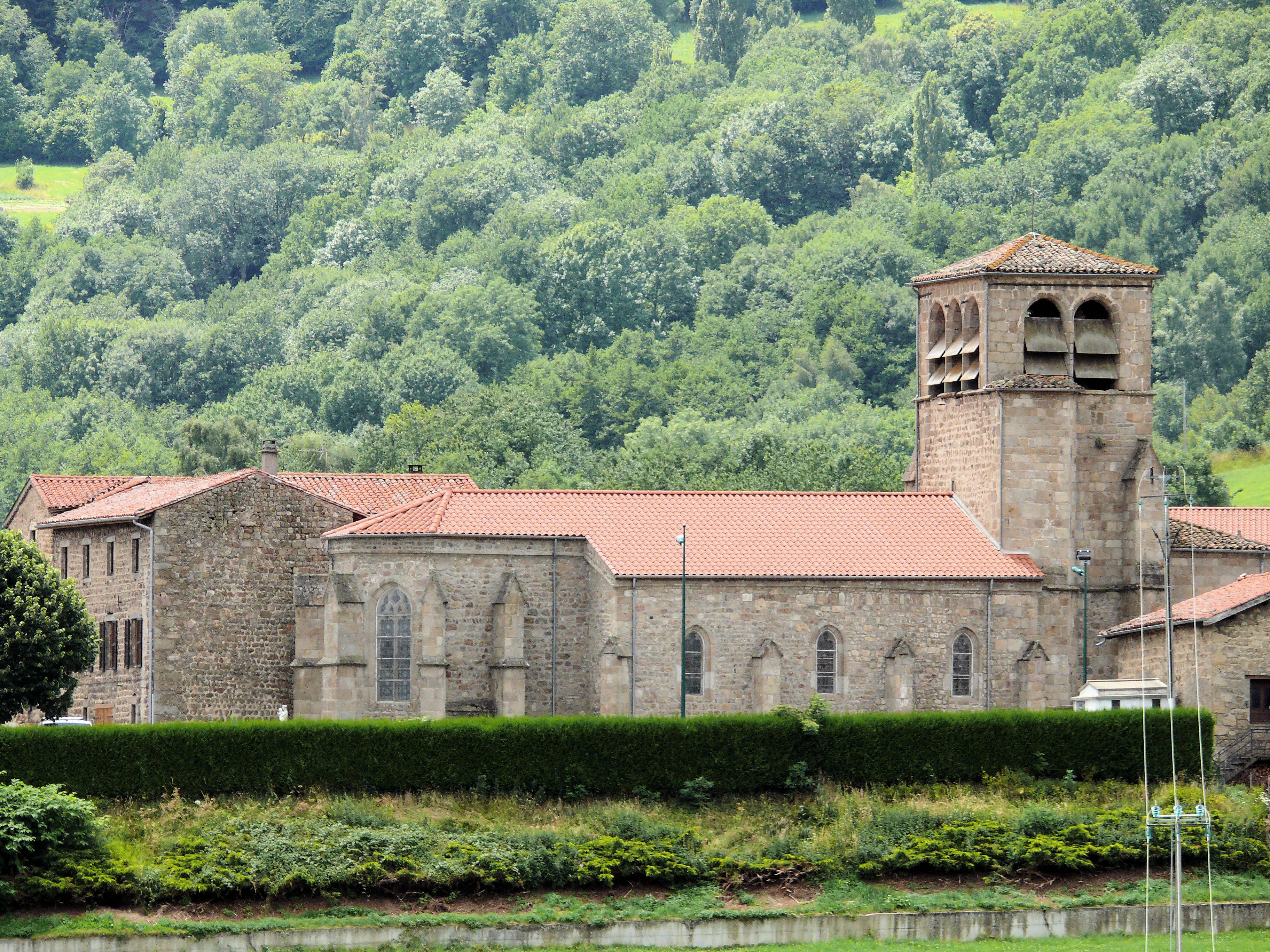 Gumières - L'église